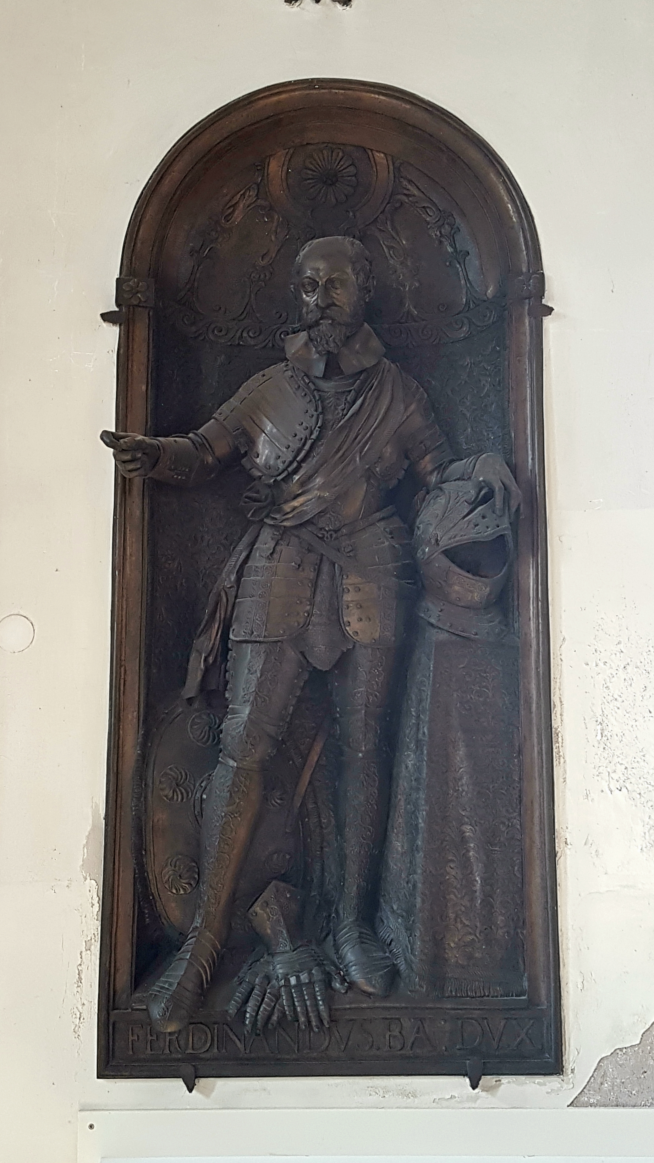 München, Hl. Geist, Grabdenkmal des